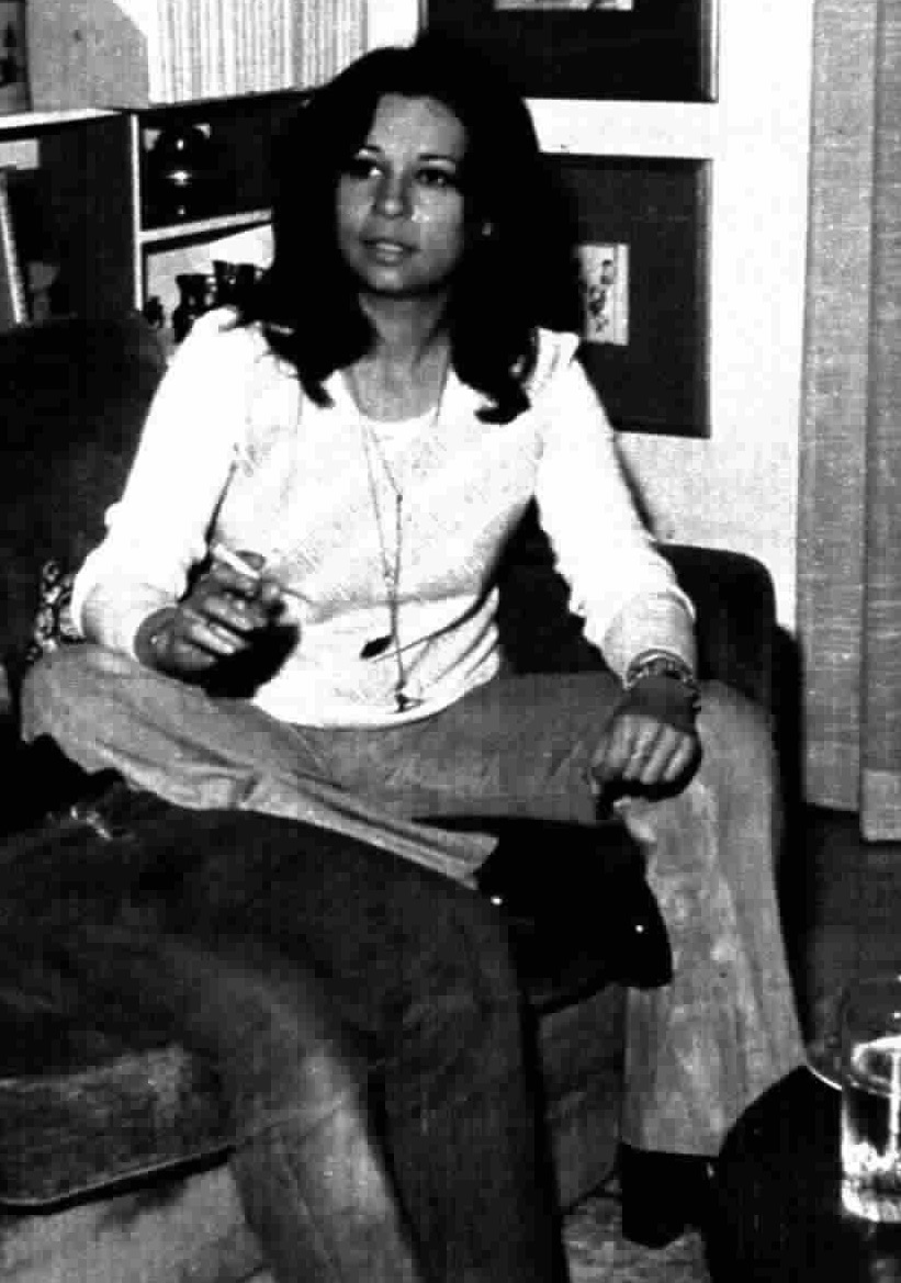 l'attrice e doppiatrice Rita Savagnone